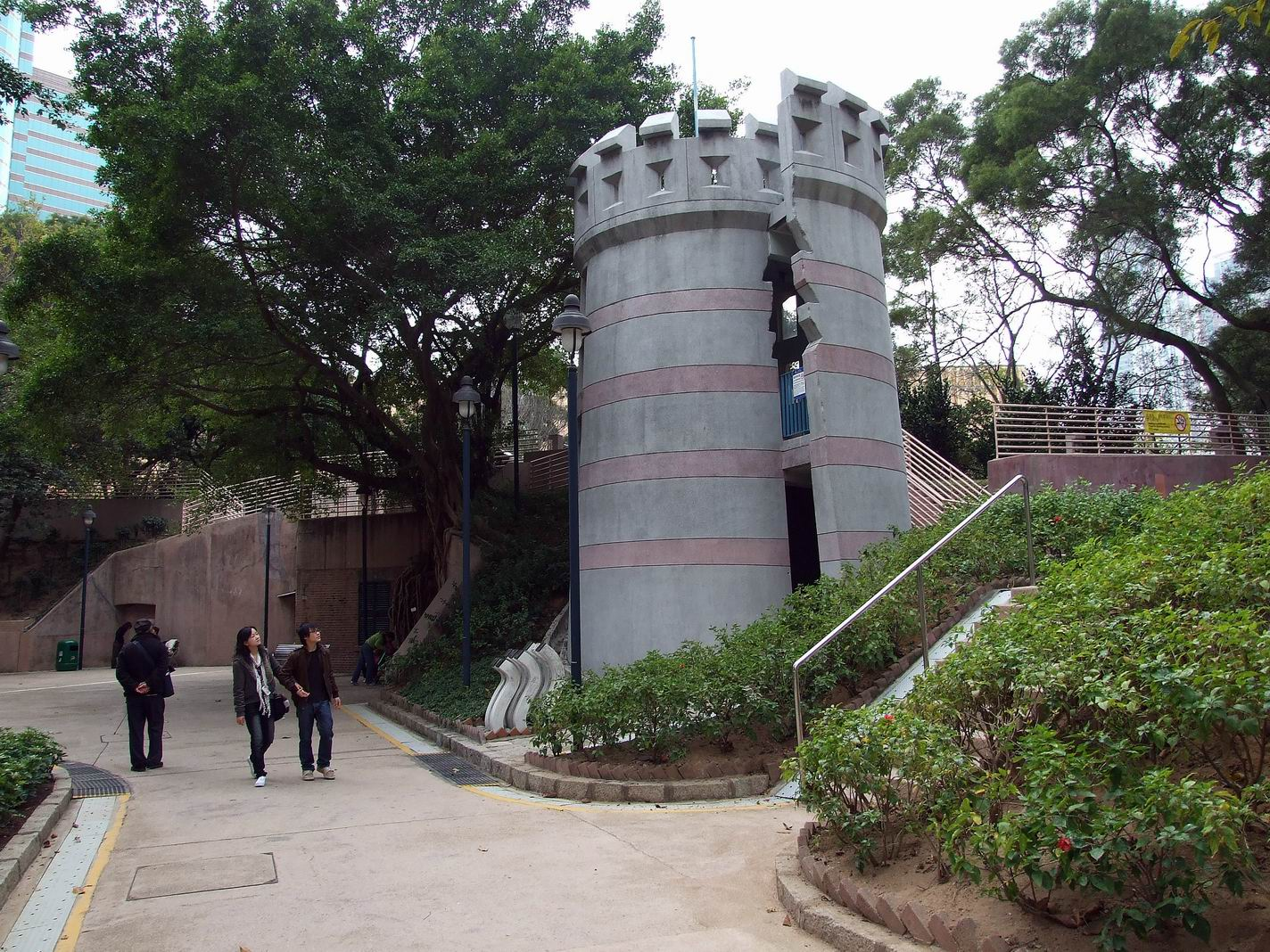 中文（香港）: 九龍公園兒童歷奇樂園